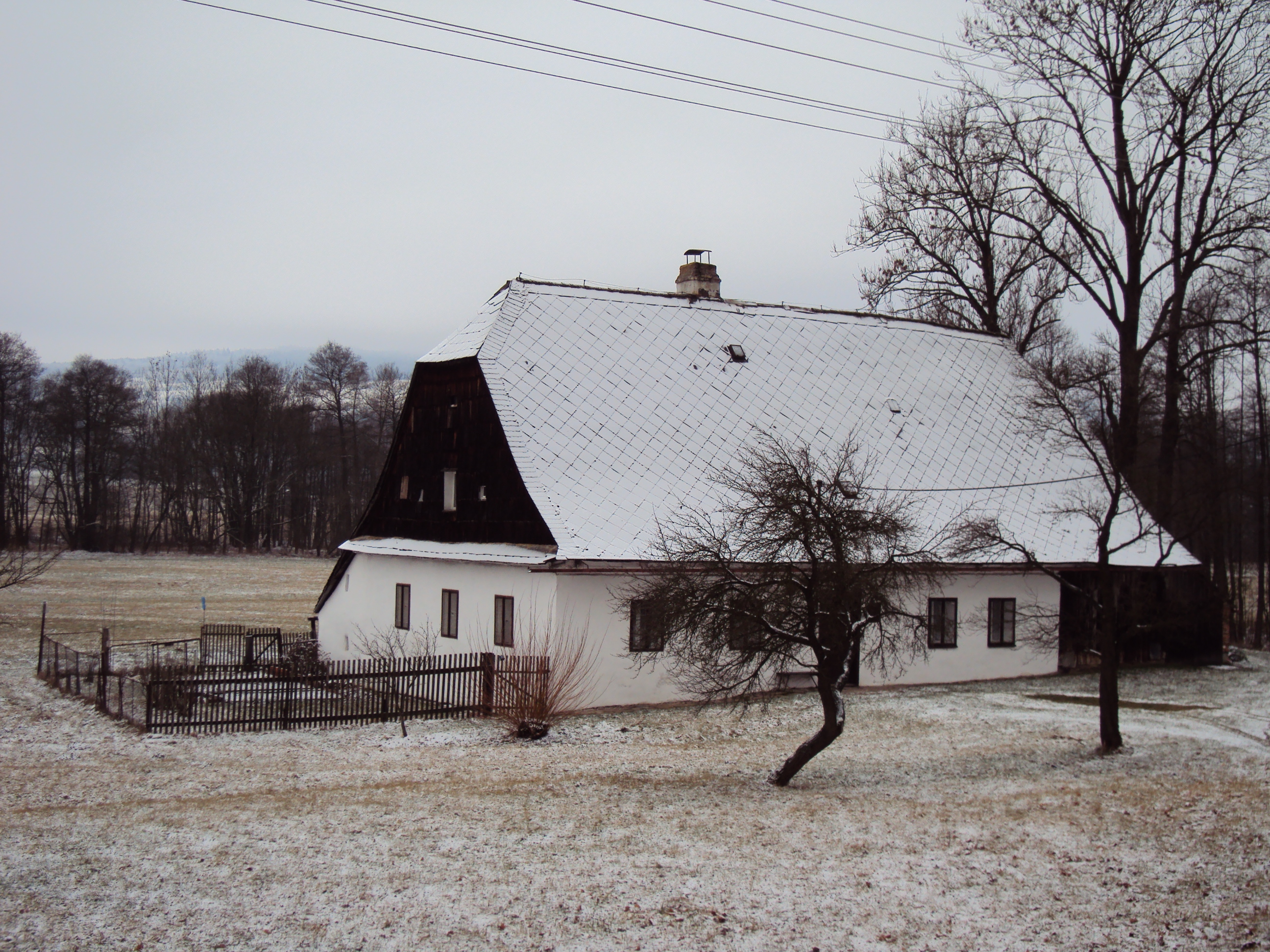 Chalupa Březná